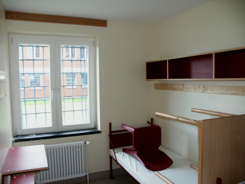 Haftraum in der JVA Hahnöfersand (Jugendstrafvollzug, Hamburg)